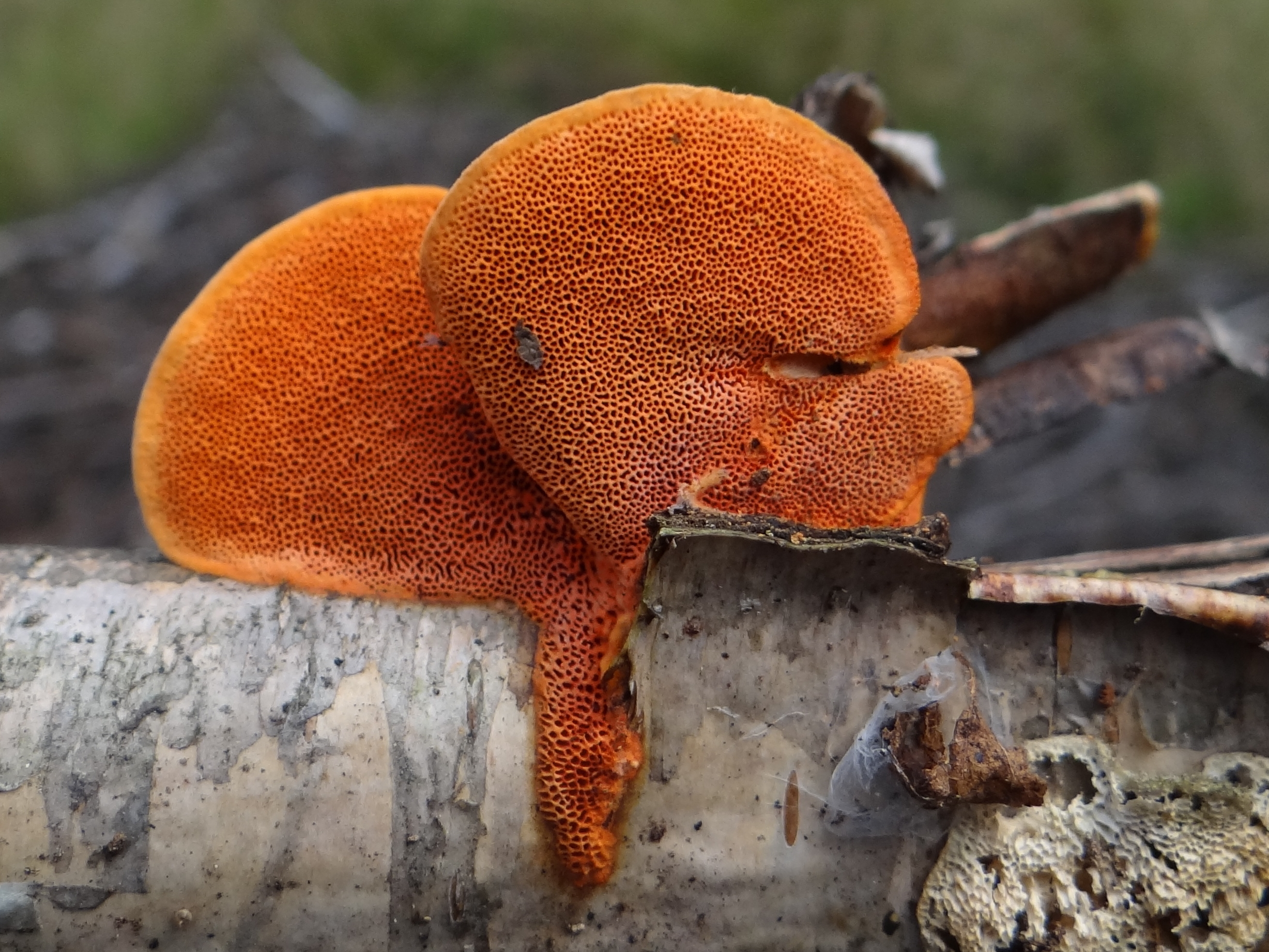 Pycnoporus cinnabarinus (location:Poland, Pogórze Wiśnickie, Wichras)